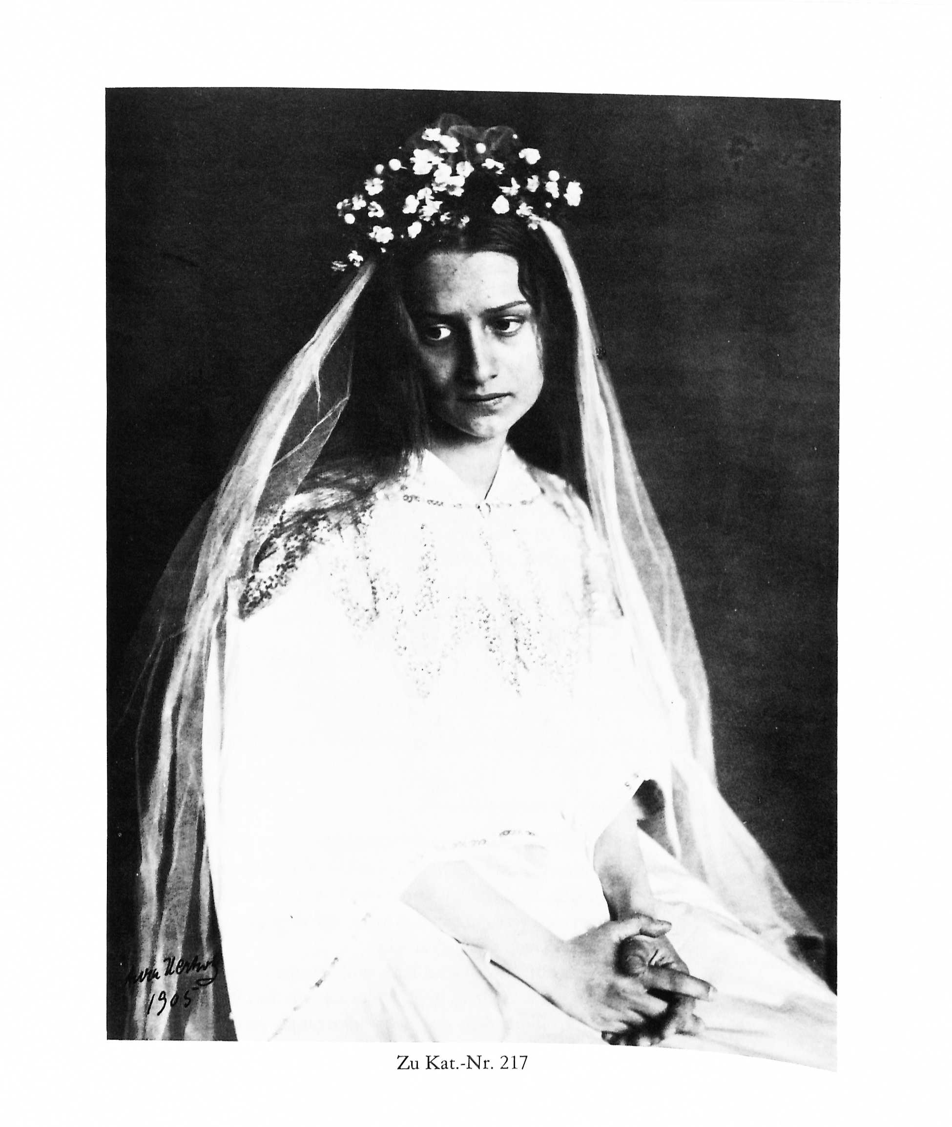 Ida Orloff als Hannele in Hanneles Himmelfahrt.